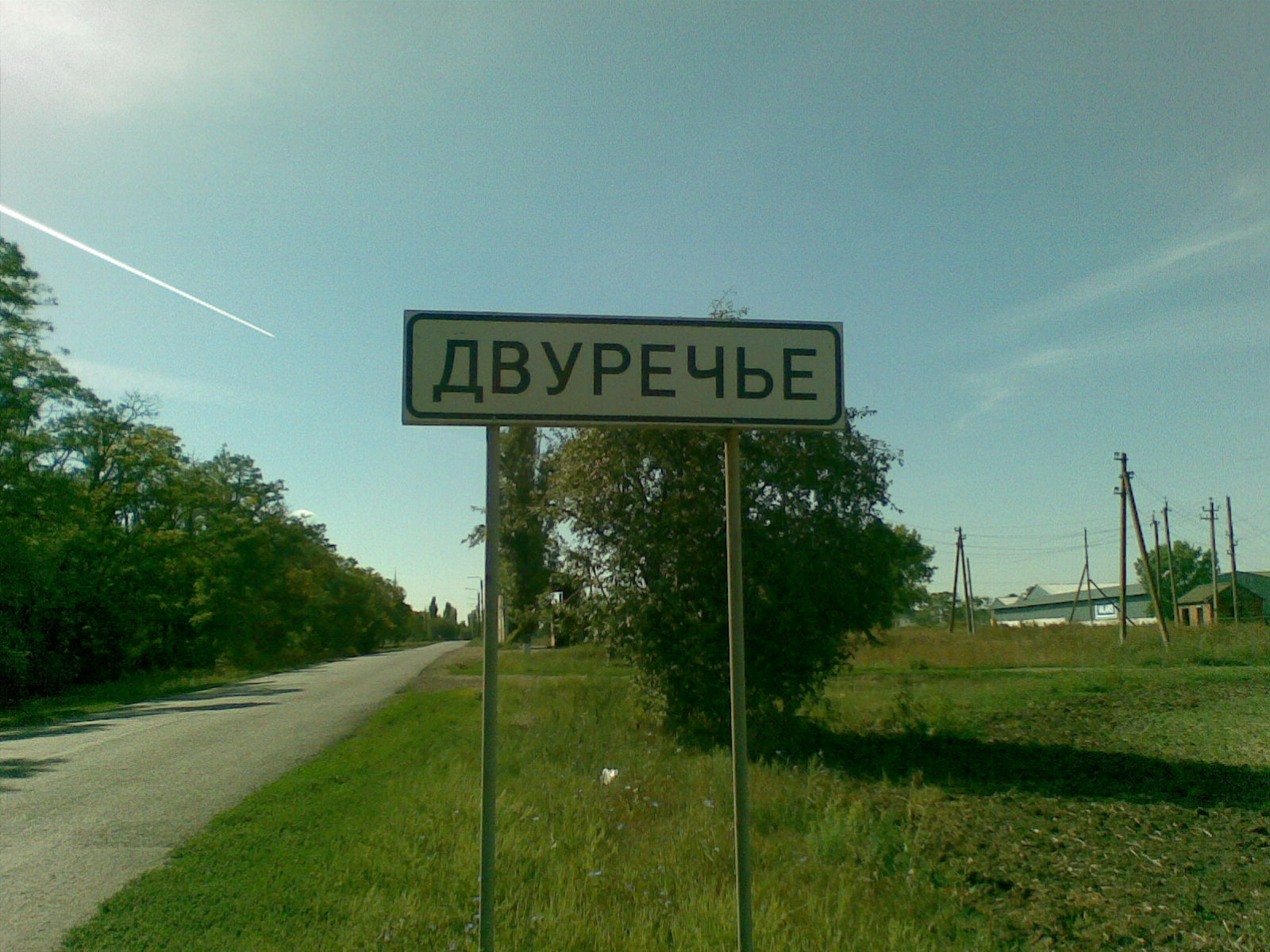 Двуречье. Дорожный указатель. Автор: Залесский Владимир Владимирович